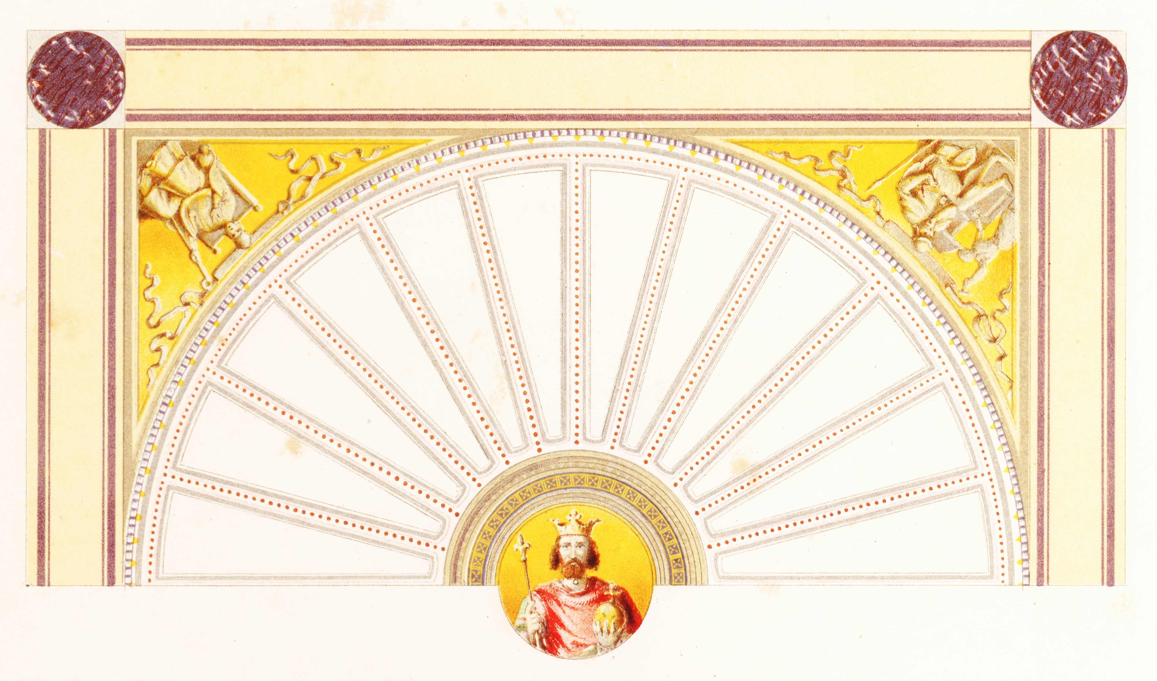 Berlin, Neues Museum: Decke des Saales für Kunstwerke des Mittelalters